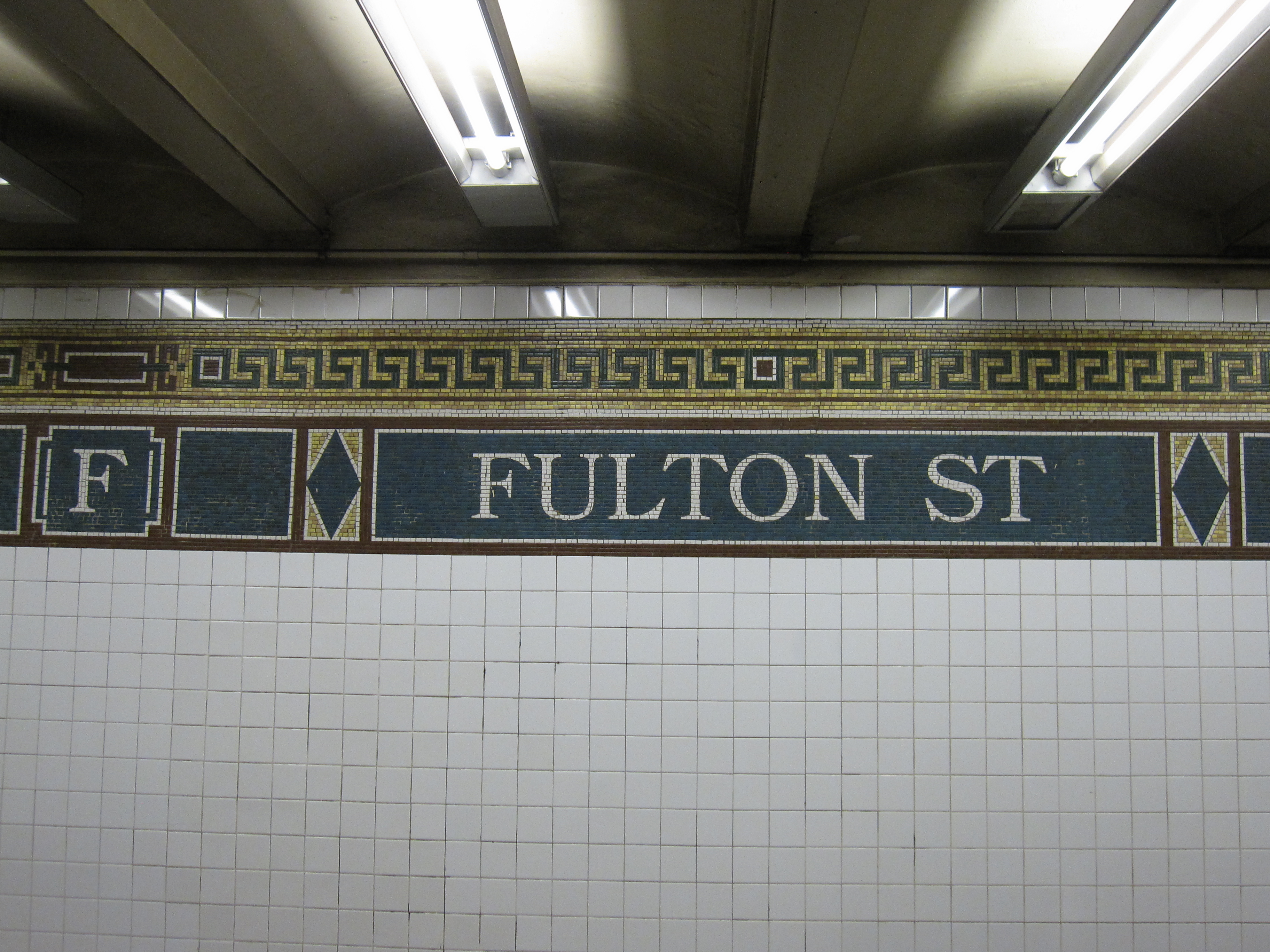 Fulton Street (BMT Nassau Street Line)